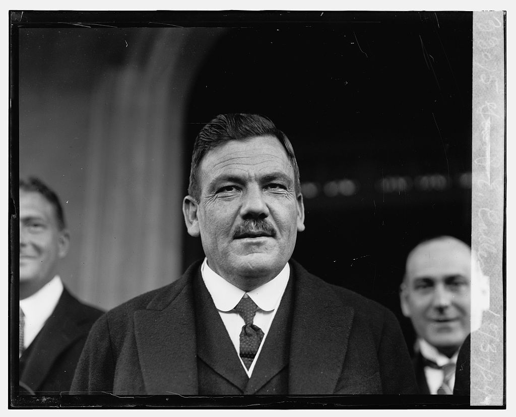 Gen. P.E. Calles, 10/31/24